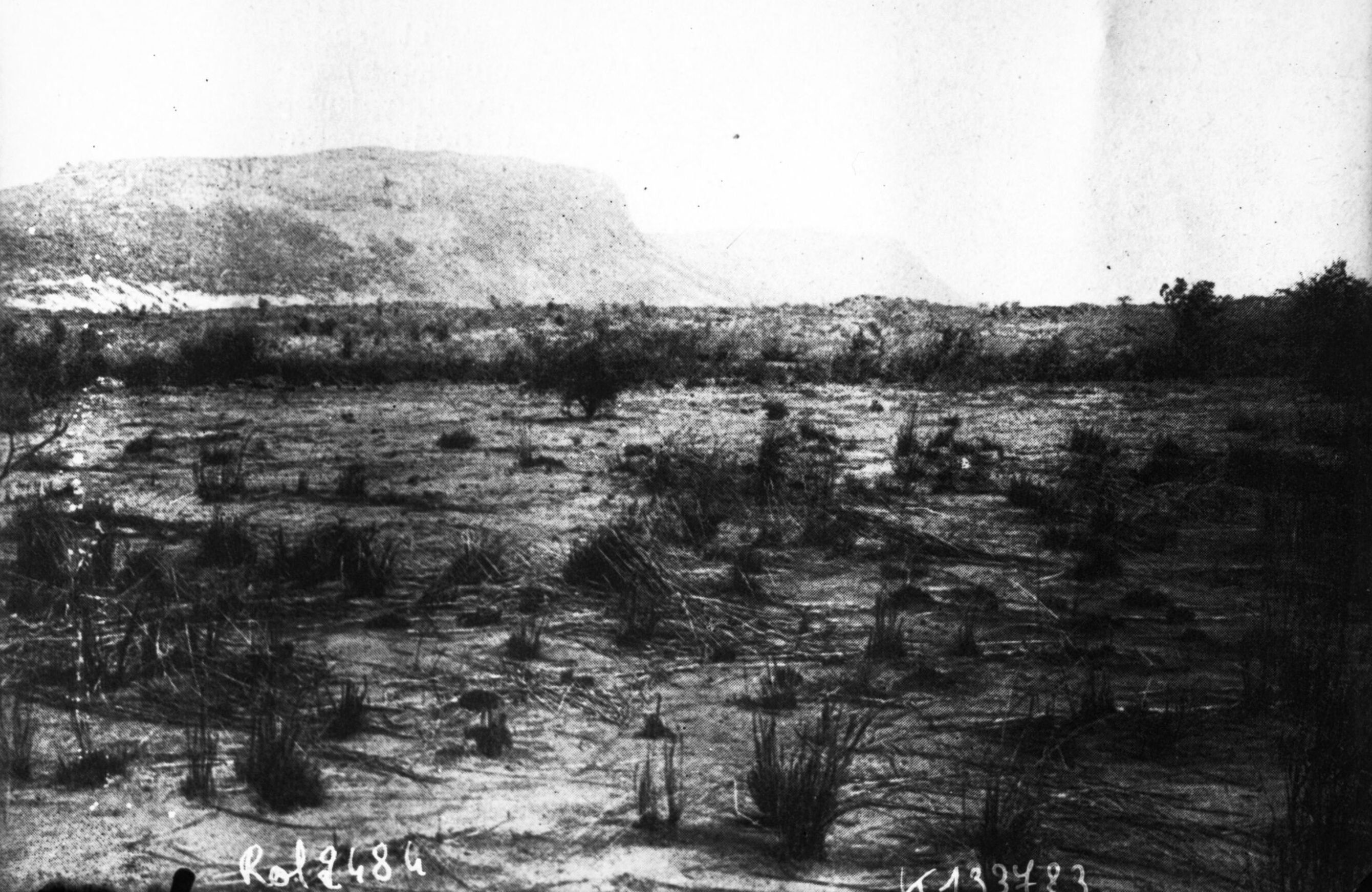 Mauritanie, Aftout et montagnes du Tagant (manoeuvres militaires à Aftout-es-Saheli)